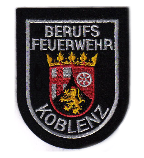 Ärmelabzeichen der BF Koblenz mit dem Landeswappen so bis ca. 1997